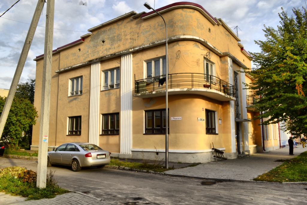 Беларуская (тарашкевіца): Гістарычны цэнтр г. Пінска: будынкі, збудаваньні, планіровачная структура, ландшафт і культурны пласт на тэрыторыі, абмежаванай з захадувул. Чарняхоўскага,з поўначы – вул. Завальнай, па мяжы дваровых тэрыторый дамоў № 1, 7,9, 11, 13, 19, 25, 27 па гэтай вуліцы, вул. Кірава, уключаючы дваровыя тэрыторыі дамоў № 1, 13 па вуліцы Кірава, з усходу – вул. Савецкай, у тым ліку дома № 5 па вул. Іркуцка-Пінскай Дывізіі, дома № 2 па вул. Кулікова, дома № 3 на пл. Кастрычніка, памяжы дваровых тэрыторый забудовы няцотнага боку дамоў № 1, 3па вул. Кіеўскай, да перакрыжаваньняз вул. Альхоўскіх, ад перакрыжаваньня з вул. Дняпроўскай Флятыліі,па вул. Дняпроўскай Флятыліі, уключаючы дваровыя тэрыторыі дамоў№ 39, 41 гэтай вуліцы, з поўдня —левым берагам р. Піна да перасячэньня з вул. Чарняхоўскага. г. Пінск This is a photo of Belarusian heritage monument. Reference number: 112Е000529 ( WLM)